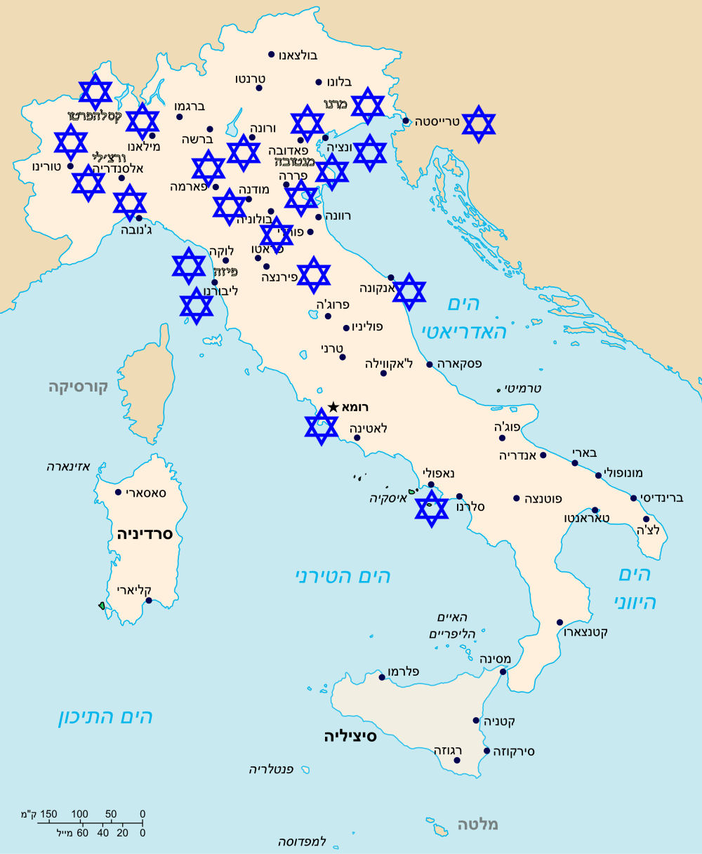 מפת הקהילות היהודיות באיטליה